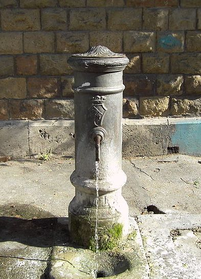 Roma, tipica fontana ottocentesca detta "Nasona" by Lalupa